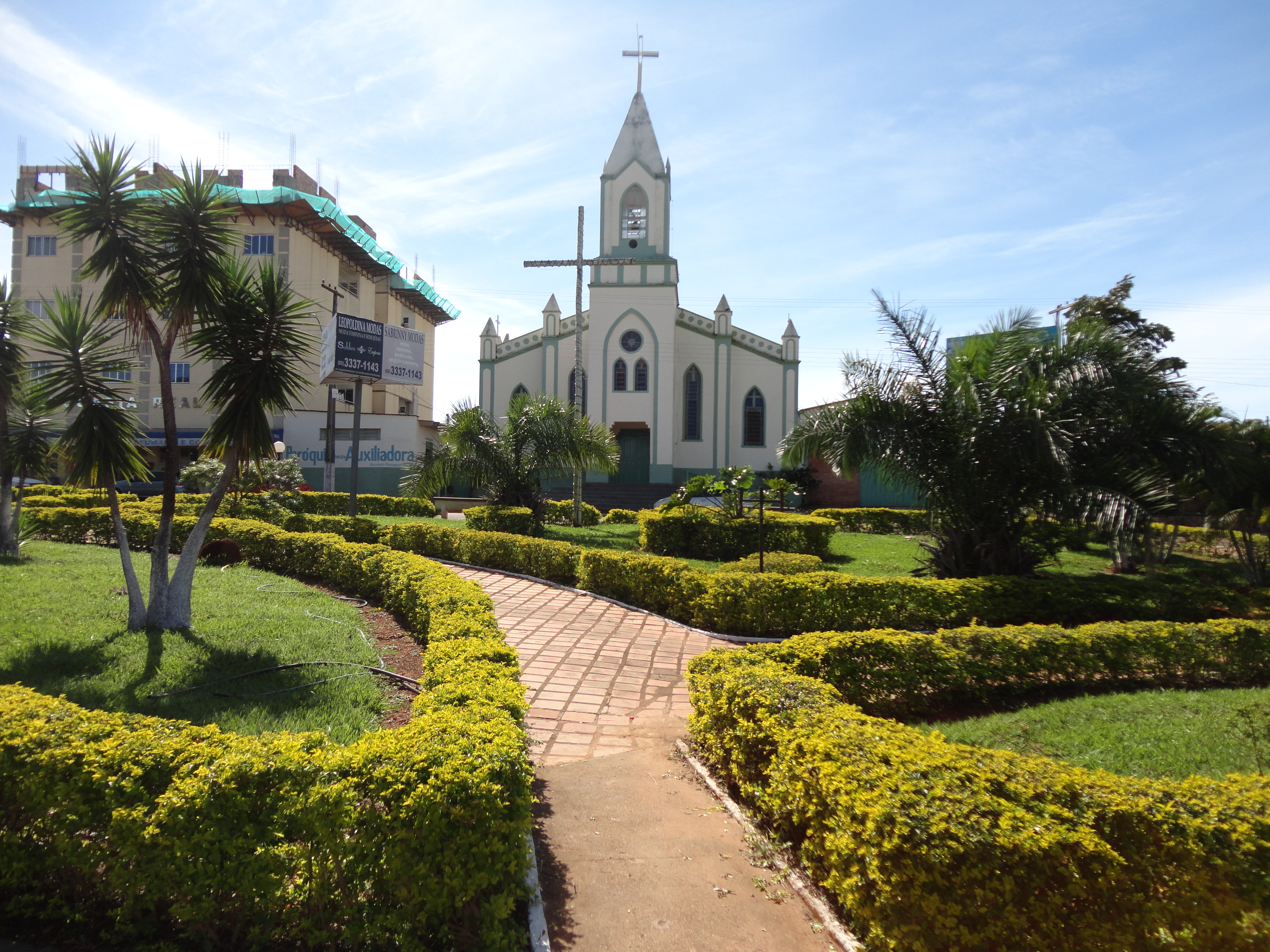 Mother Church of the Mary Help of Christians in Leopoldo de Bulhoes, Goias